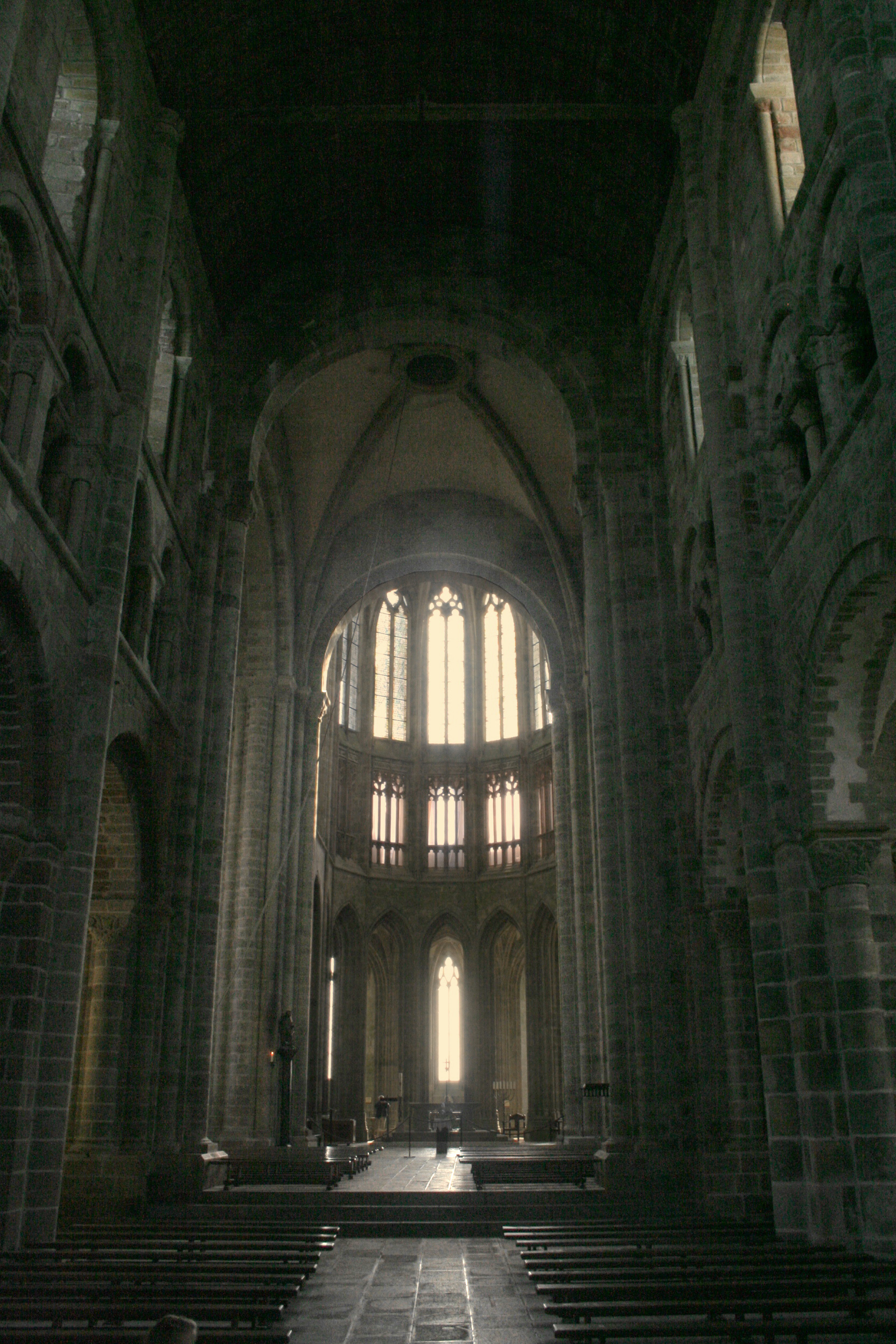 Nef de l'Abbaye du Mont Saint-Michel